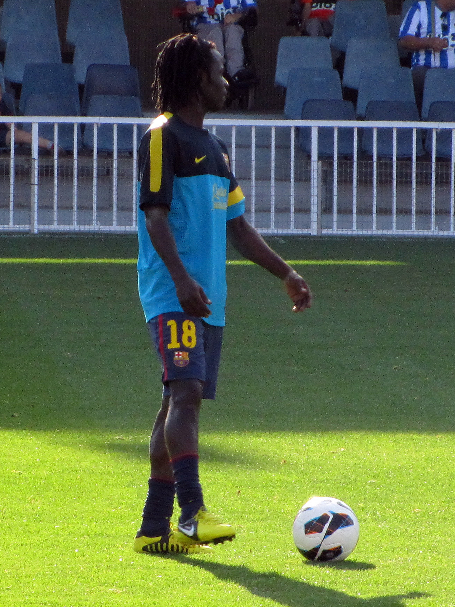 Agostinho Cá in a FC Barcelona/FC Barcelona training kit Foto realizada por Javier Segura (@castroquini)